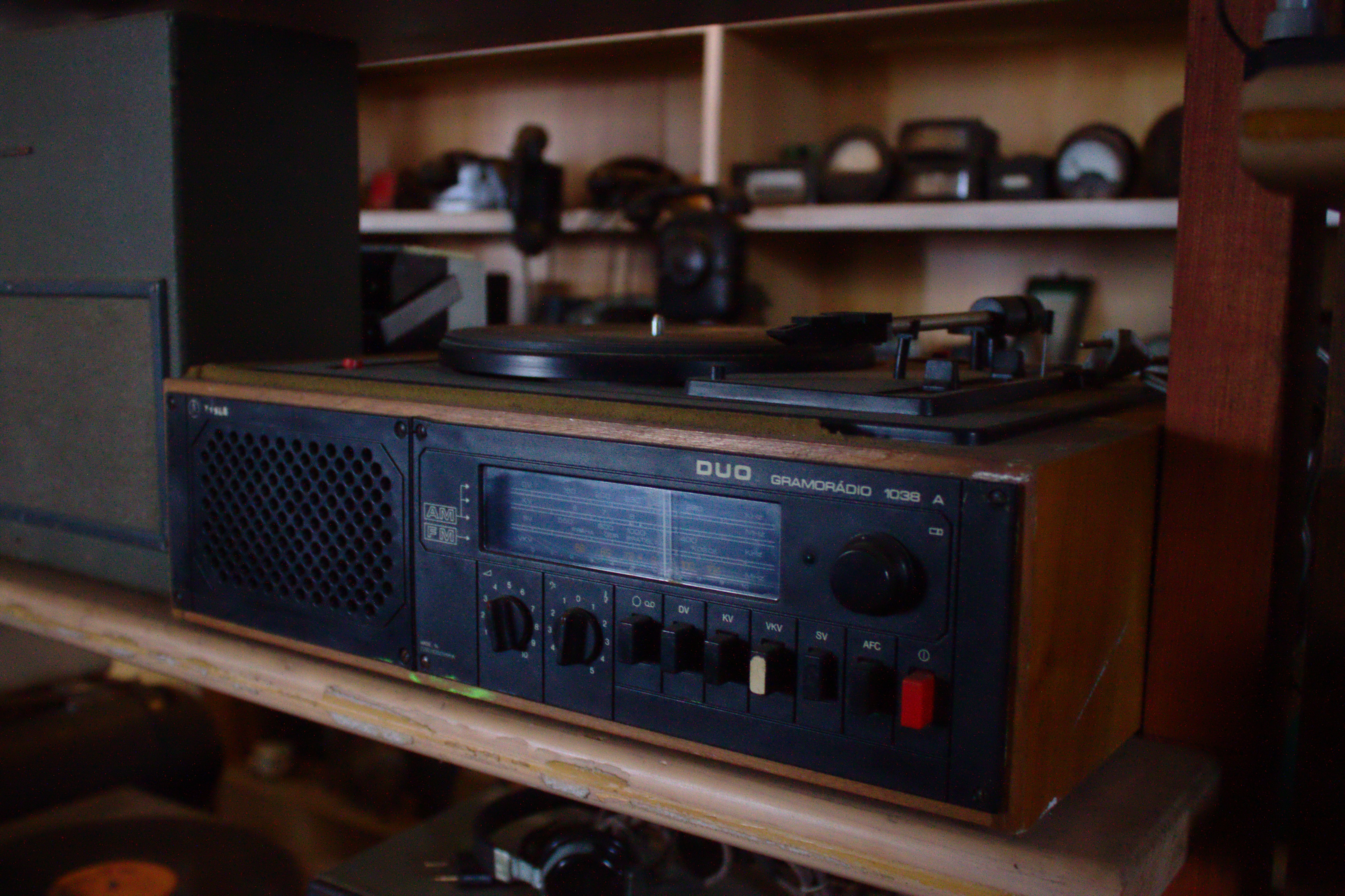 Radiopříjímač ve venkovském muzeu v obci Pořežany Project: Fotíme Česko